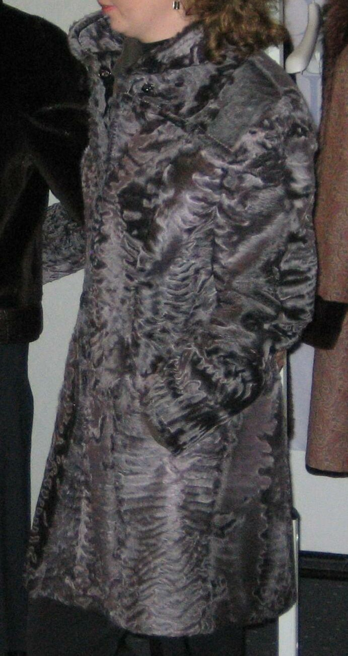 Swakara karakul coat, coloured